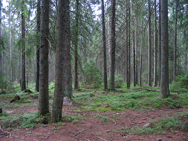 zdjęcie udostępnione przez Wikipedysta Dixi